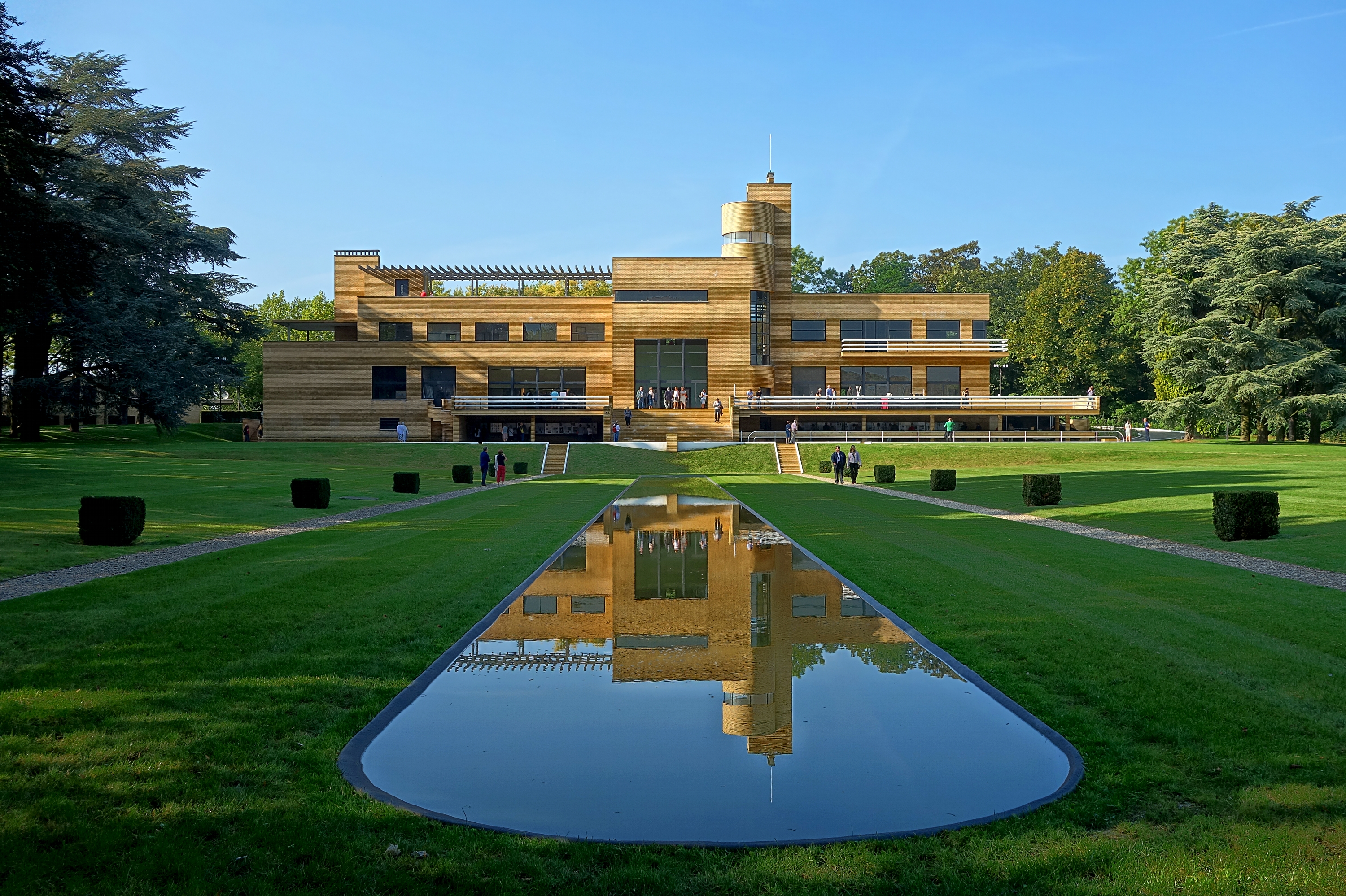 Villa Cavrois (Classé) à Croix, Nord. .